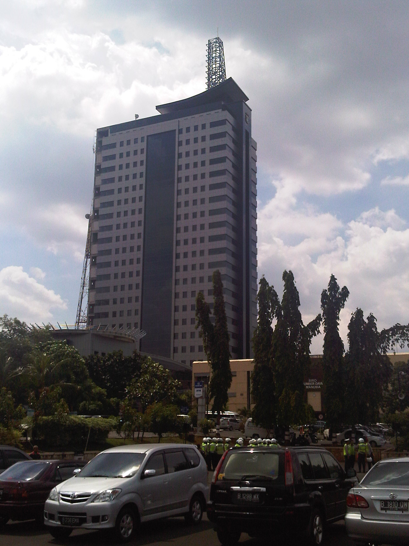 Gedung Densus 88, Polda Metrojaya